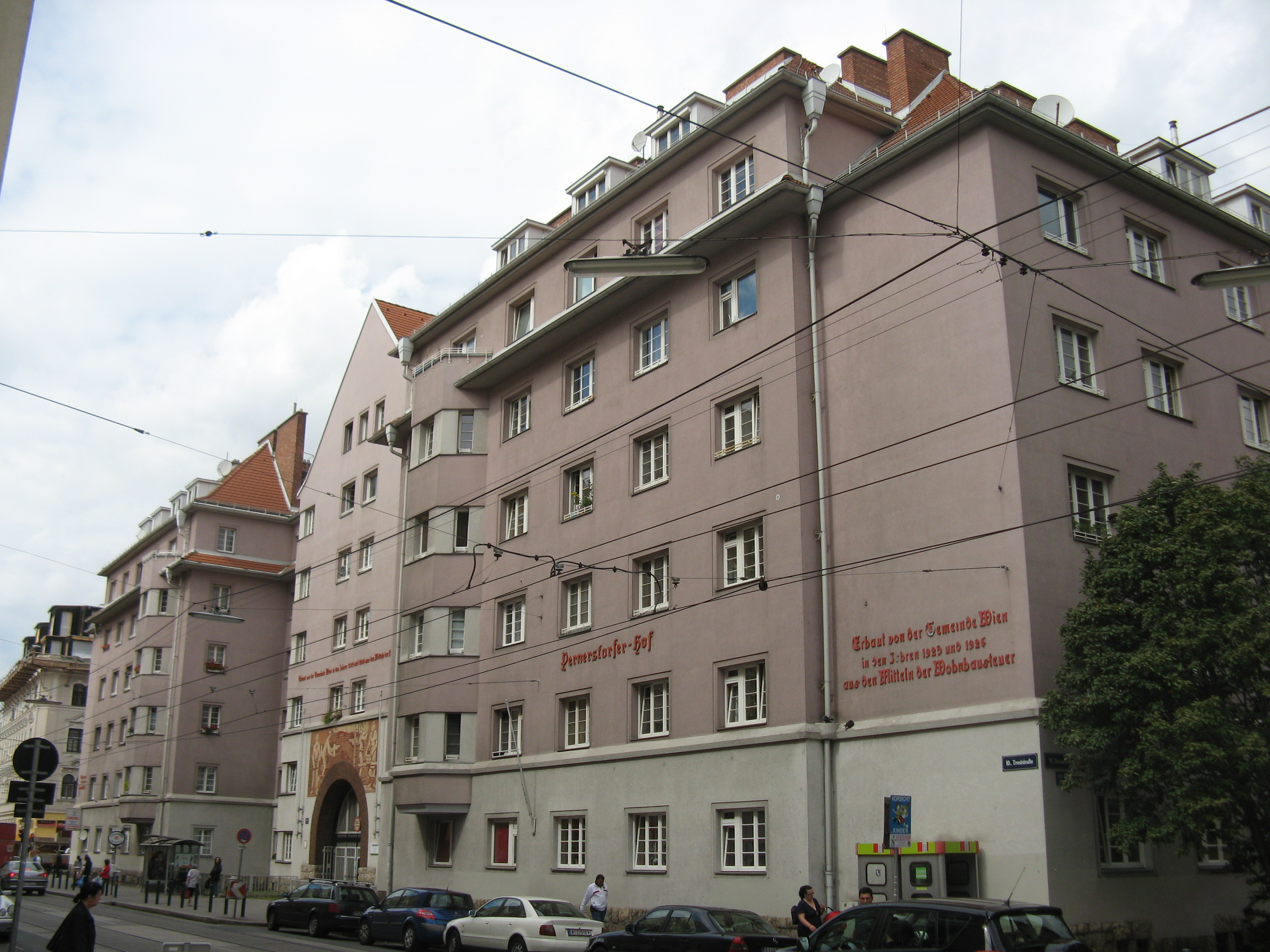 Pernerstorferhof (1925-26) von Camillo Fritz Discher und Paul Gütl, Troststraße 68-70, Wien-Favoriten